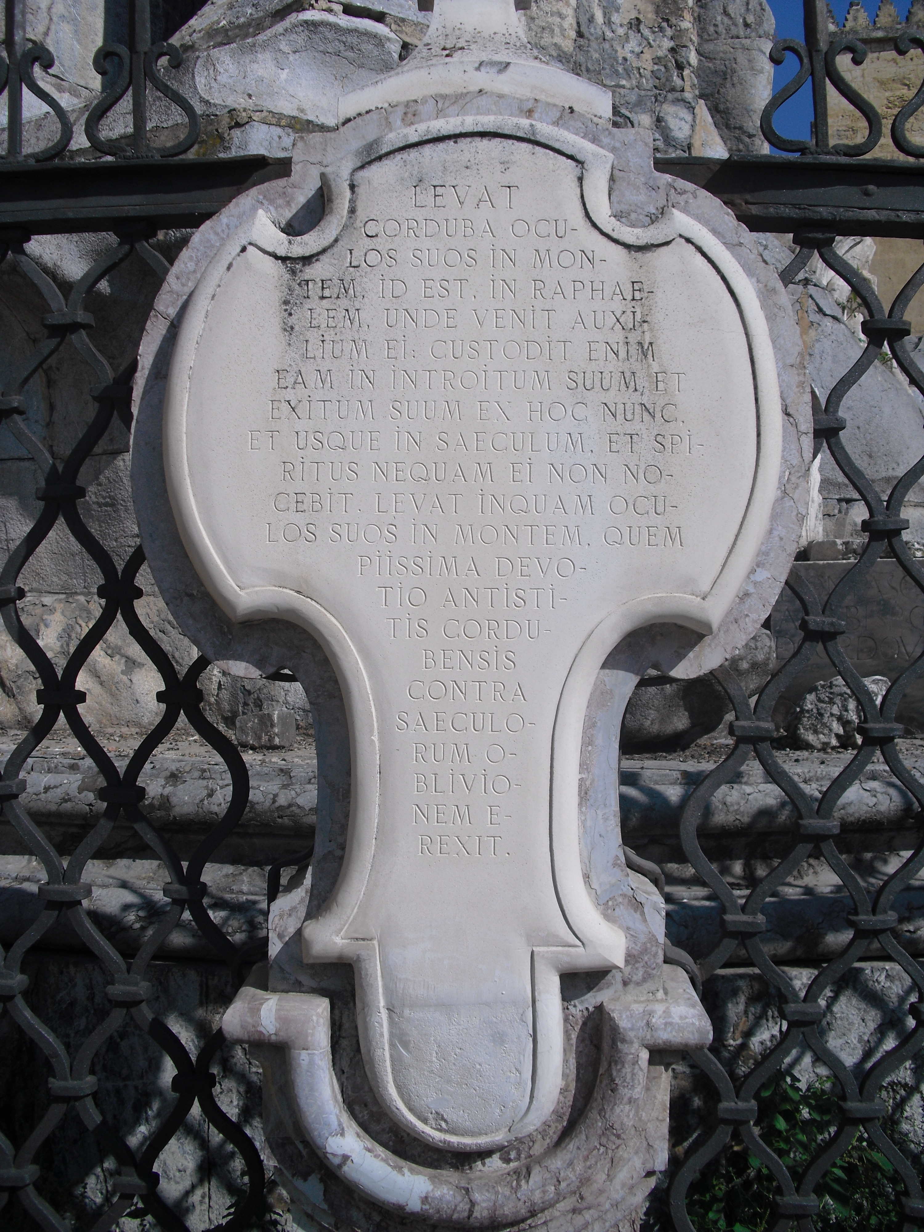 Inscripción en el Triunfo de San Rafael de la Puerta del Puente, Córdoba (España). Dice: "LEVAT CORDUBA OCULOS SUOS IN MONTEM, ID EST, IN RAPHAELEM, UNDE VENIT AUXILIUM EI: CUSTODIT ENIM EAM IN INTROITUM SUUM, ET EXITUM SUUM EX HOC NUNC, ET USQUE IN SAECULUM, ET SPIRITUS NEQUAM EI NON NOCEBIT. LEVAT INQUAM OCULOS SUOS IN MONTEM, QUEM PIISIMA DEVOTIO ANTISTITIS CORDUBENSIS CONTRA SAECULORUM OBLIVIONEM EREXIT"